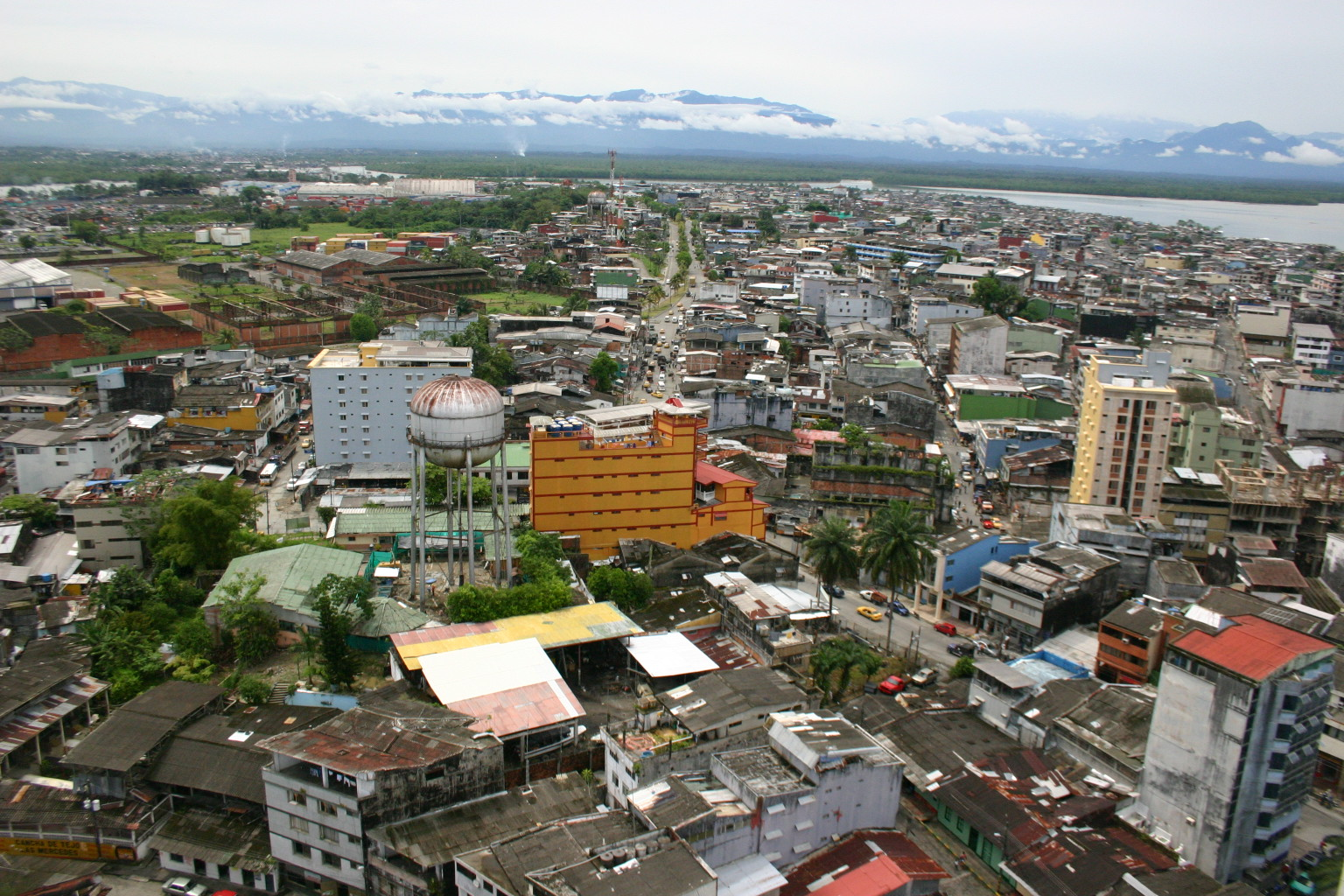 Panoramica de Buenaventura-colombia